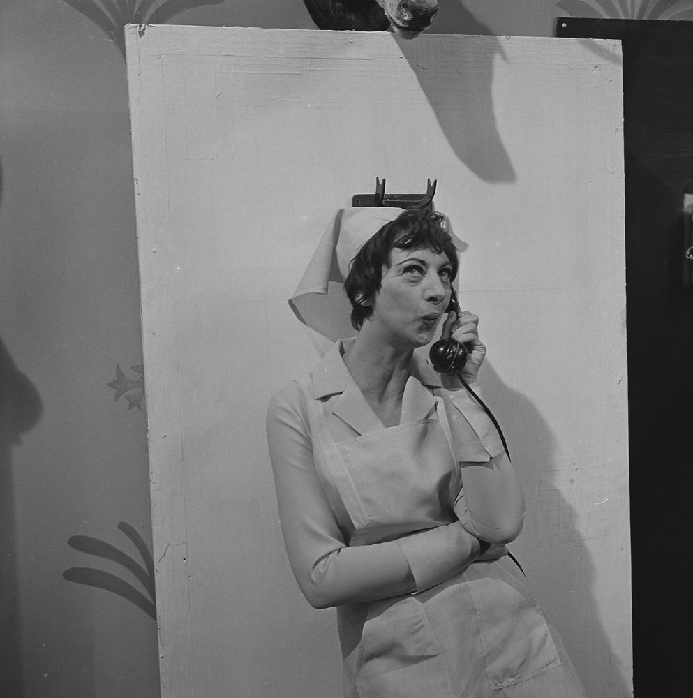 Hetty Blok als Zuster Klivia tijdens de opnamen van Ja zuster, nee zuster. (Afl. 1: Gerrit)